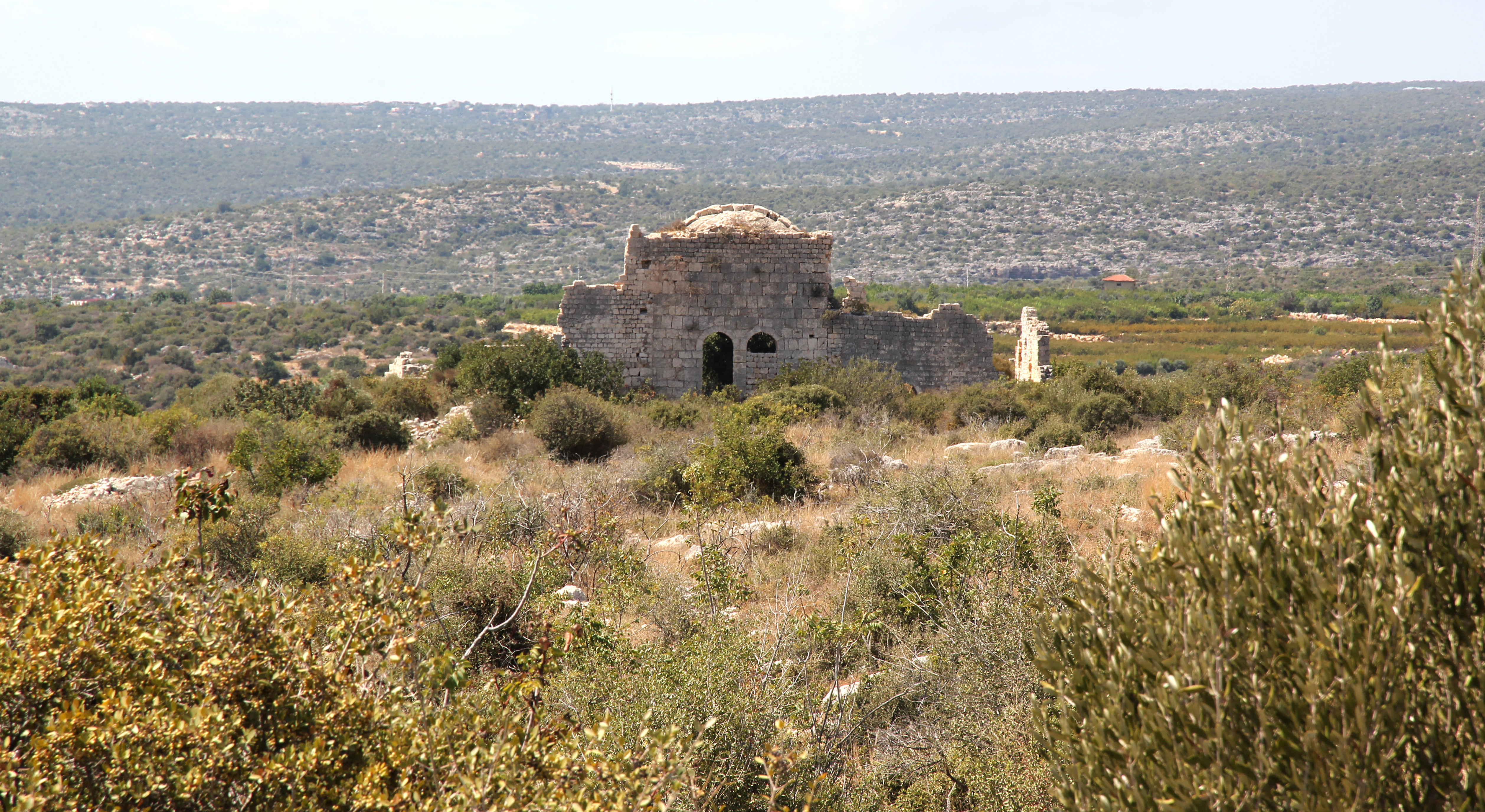 Korykos, archäologischer Fundort in der Südtürkei, Grabeskirche von Osten